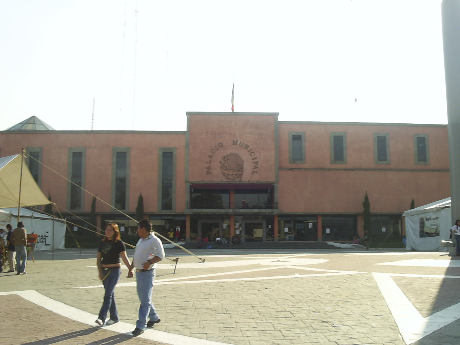 Palacio municipal y explanada del zócalo de Ecatepec